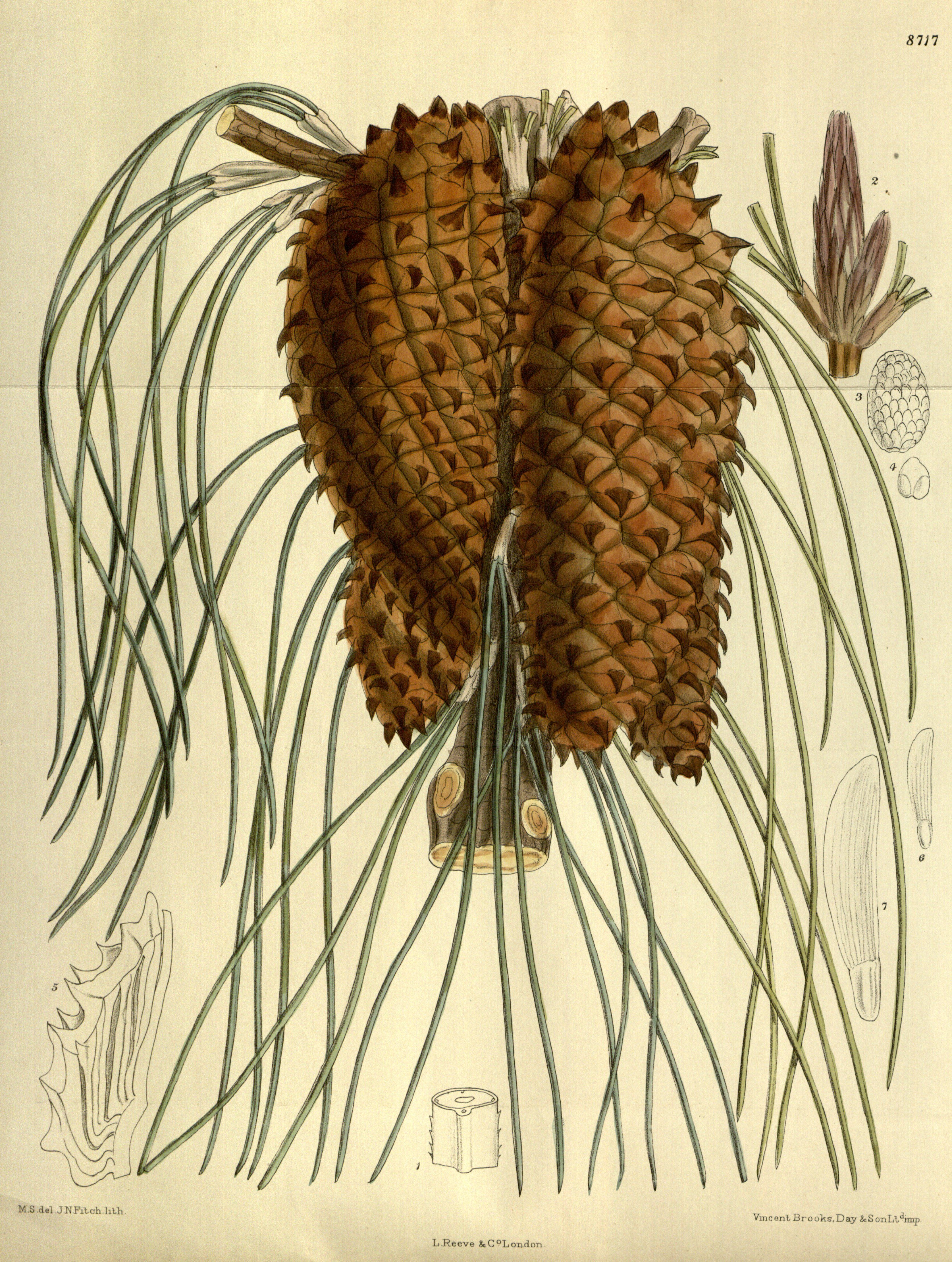 Pinus tuberculata (= Pinus attenuata), Pinaceae